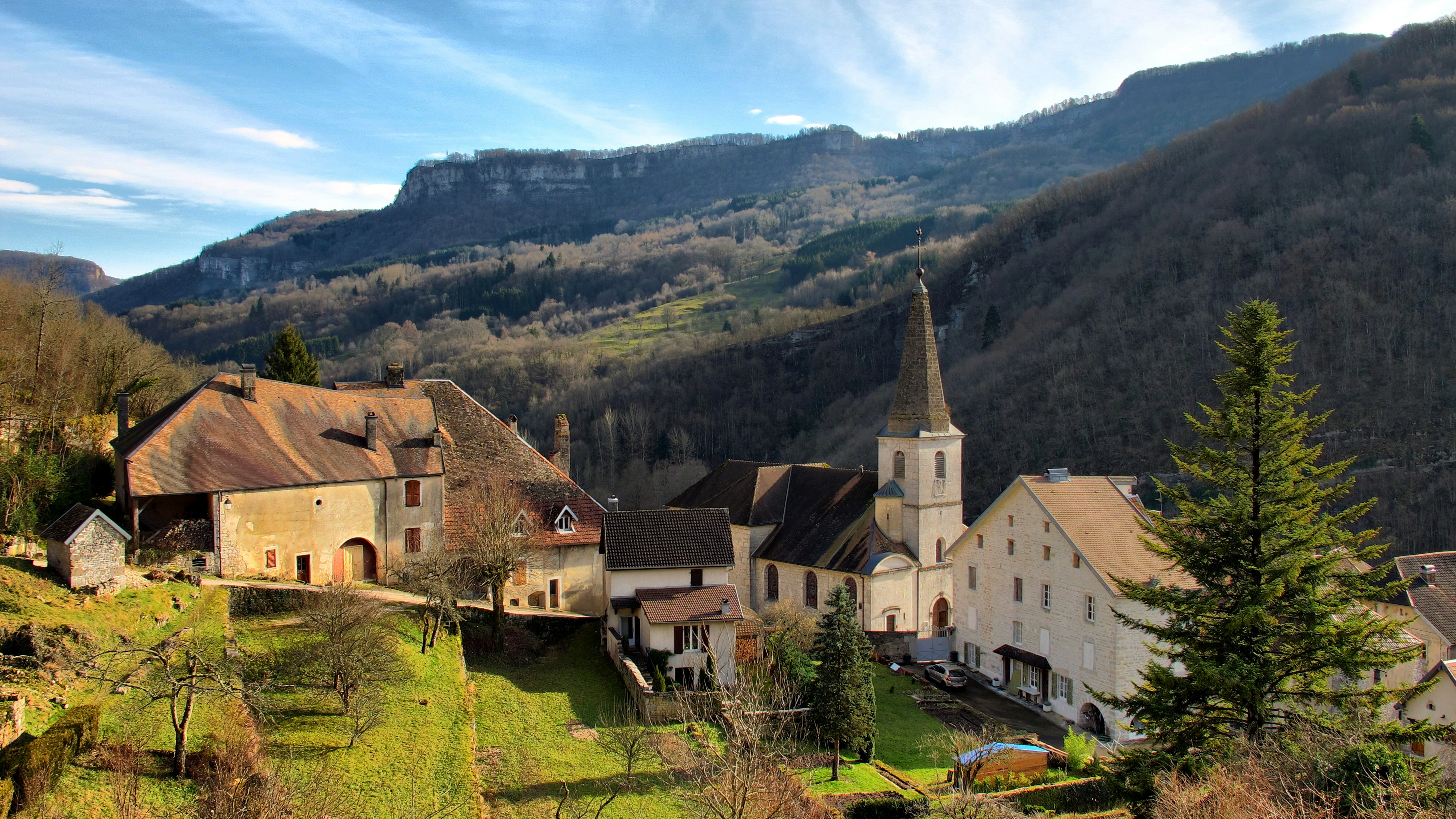 La partie haute du village de Lods avec l'église